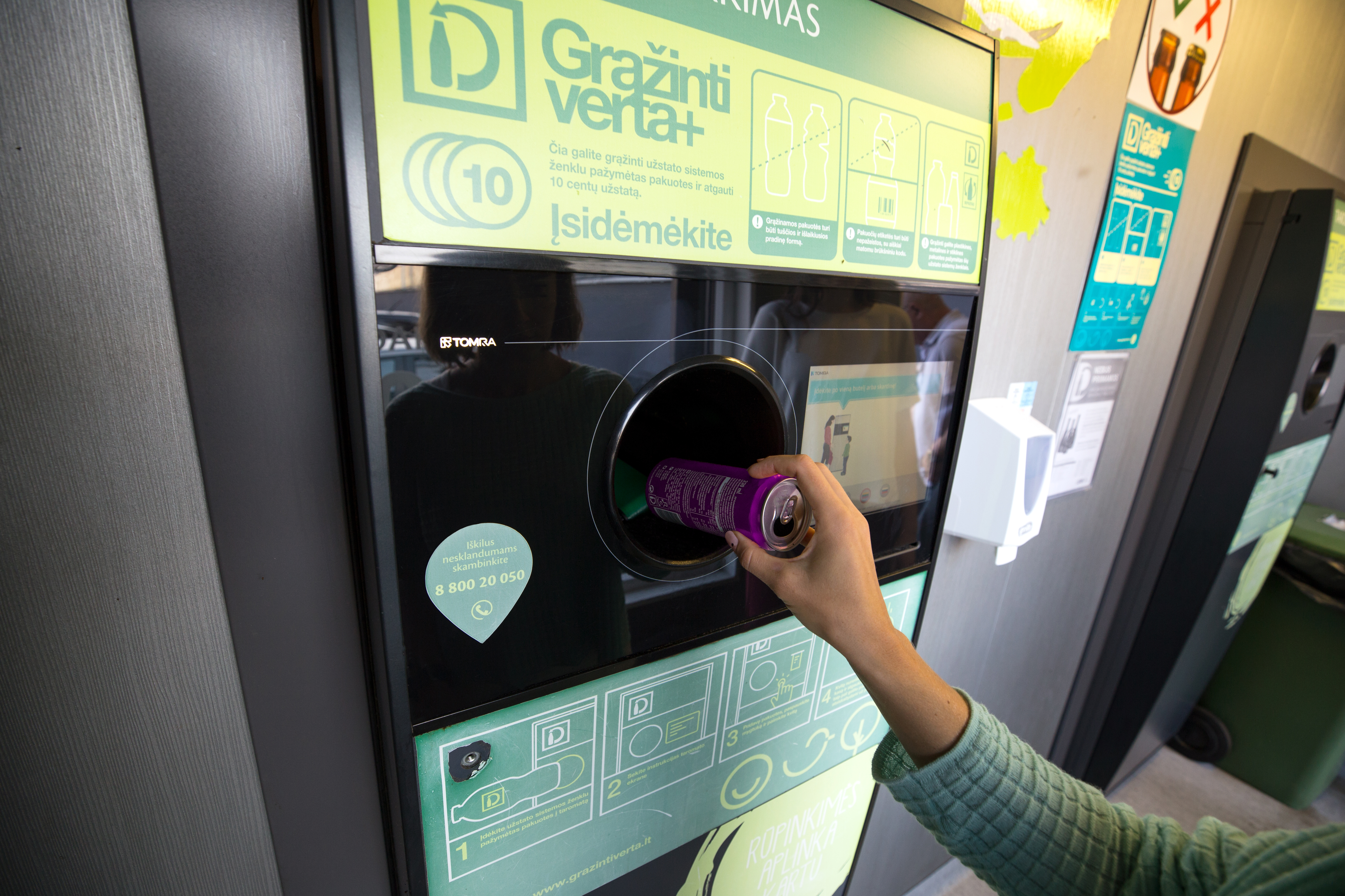 Skardinė dedama į taromatą Lietuvoje